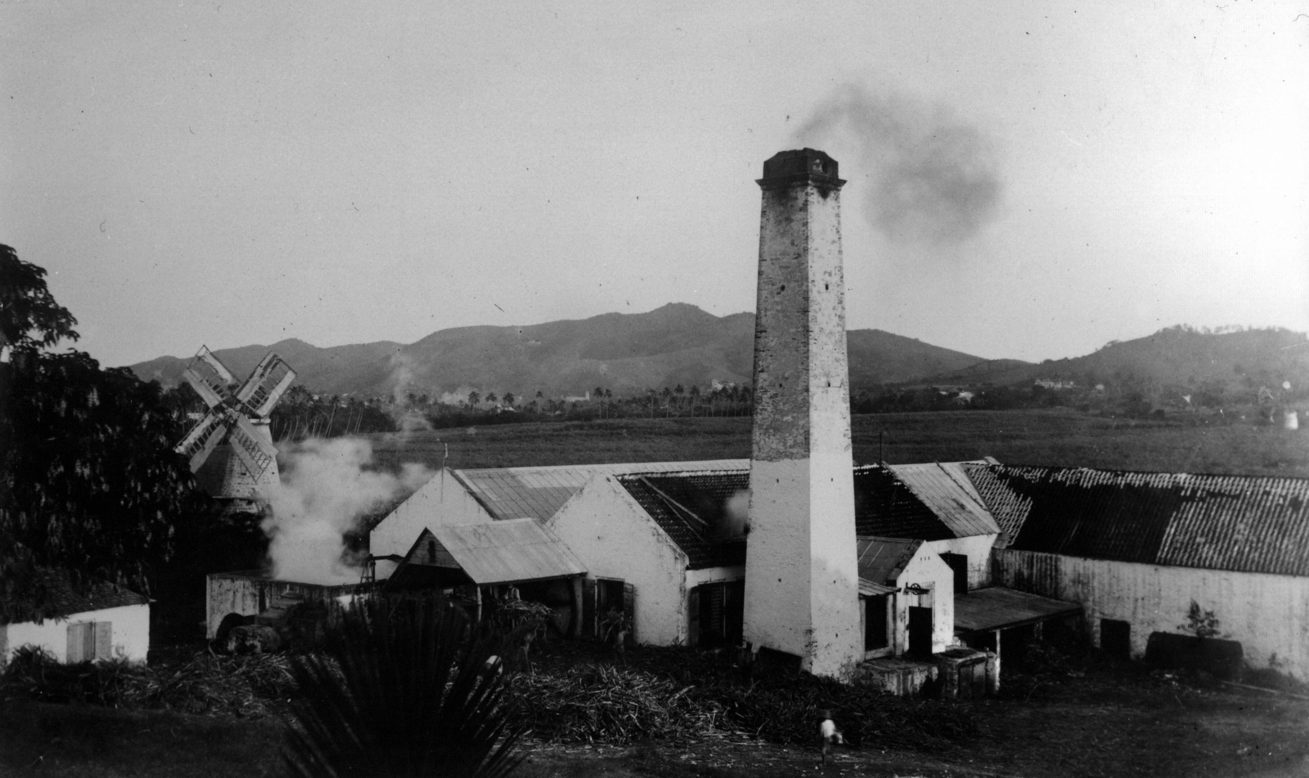 No. dnt_dvi_b_00480 Photo: Frederik Børgesen